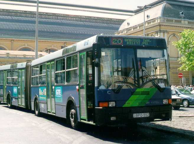 Ikarus 435 városi-elővárosi csuklós autóbusz a BKV gyors 20-as járműveként (Budapest-Keleti pályaudvar)